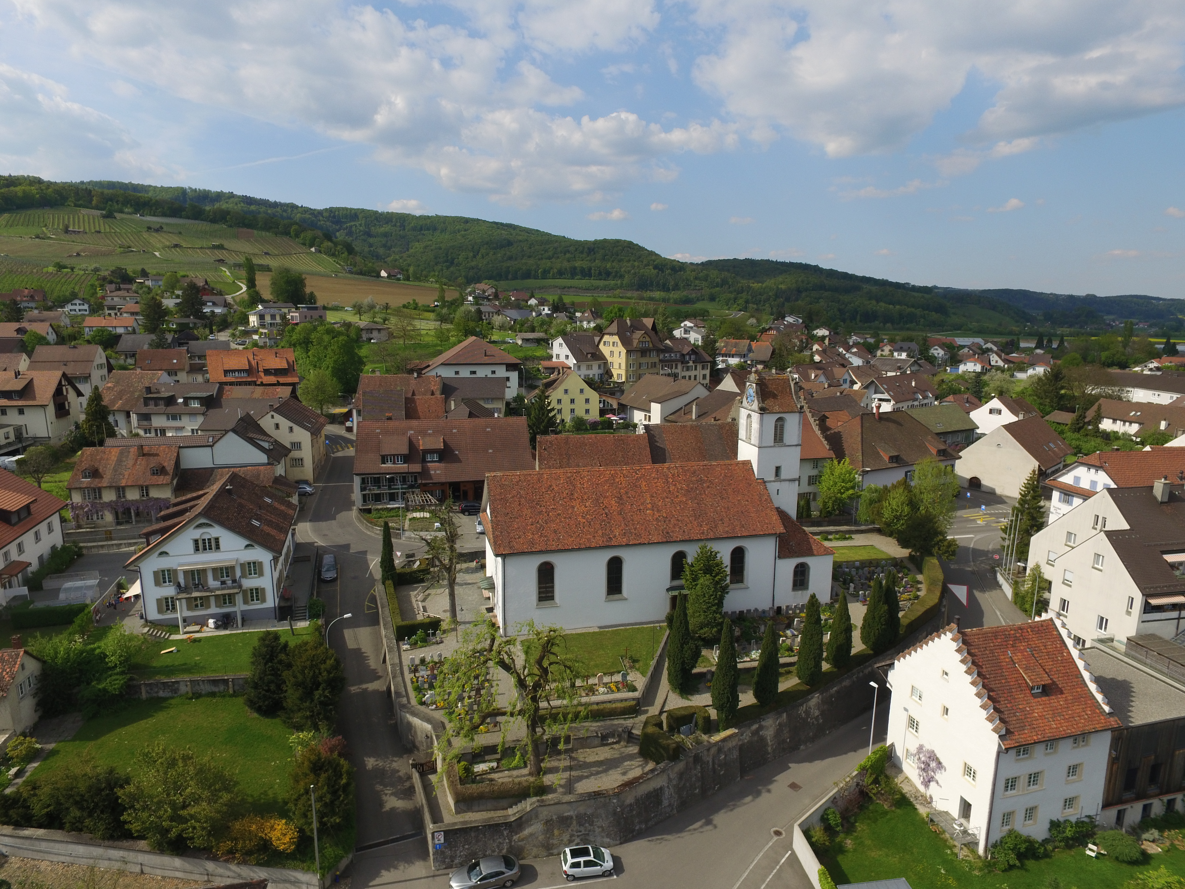 Jurapark Aargau, Reformierte Kirche Schinznach